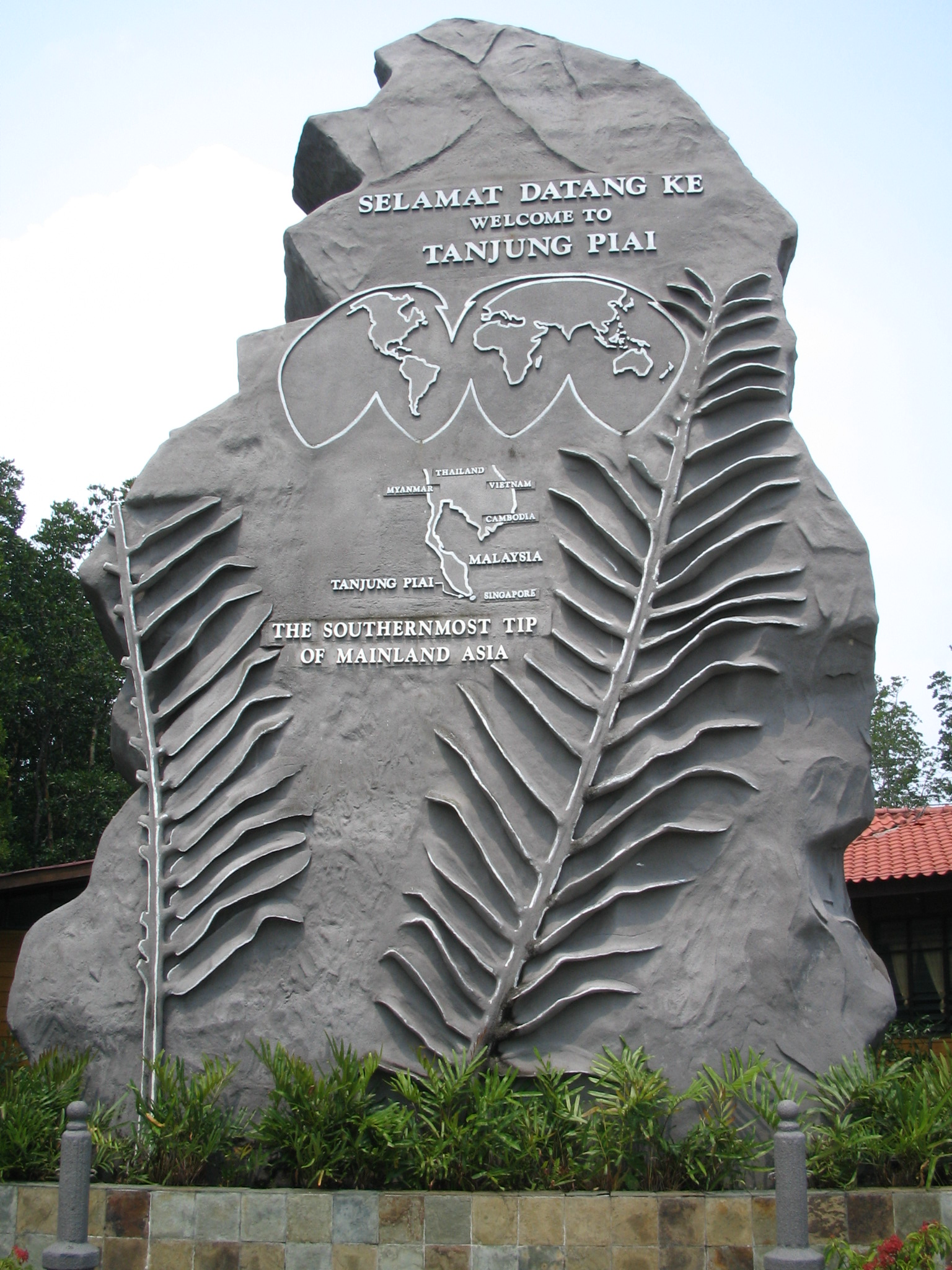 タンジュン・ピアイにあるアジア大陸最南端の石碑